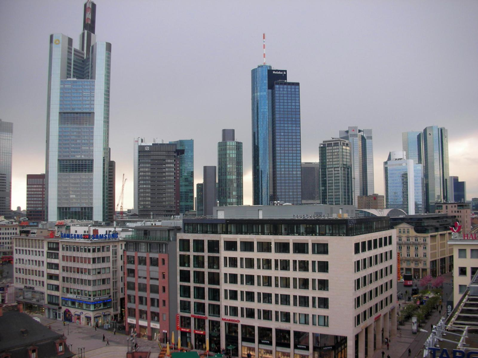 Bankenhäuser in Frankfurt